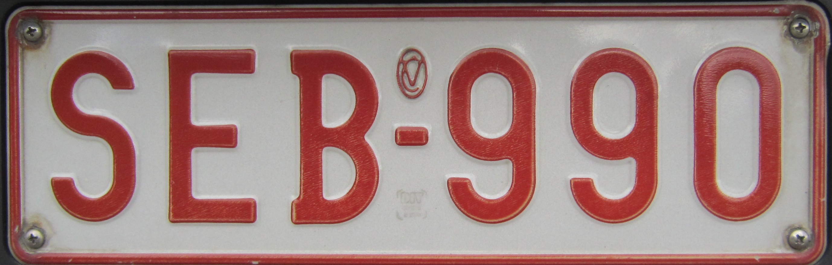 kentekenplaat België